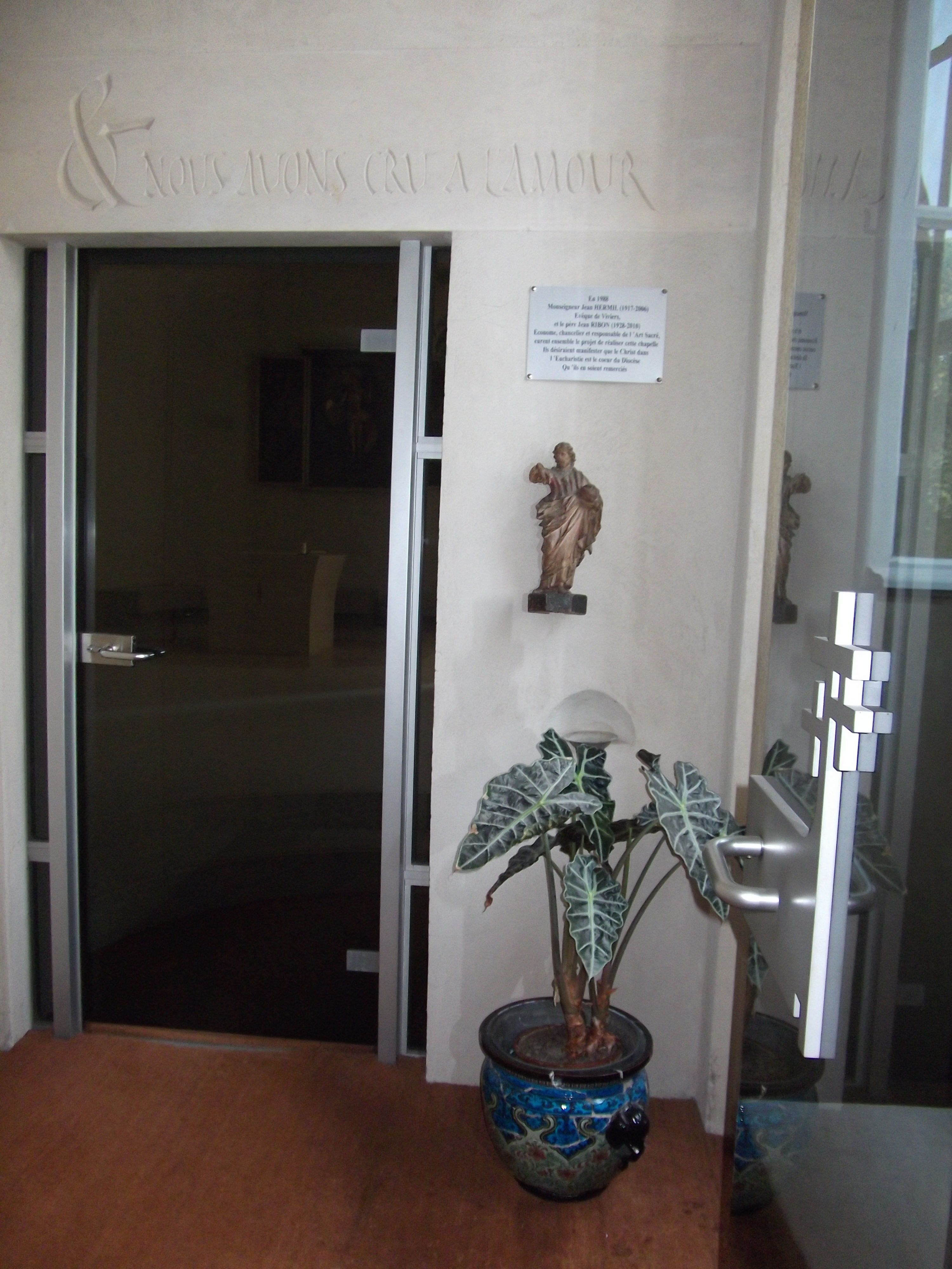 Porte d'entrée de la Chapelle de l'évêché de Viviers